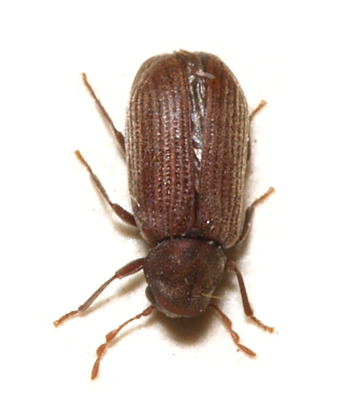 Anobium punctatum